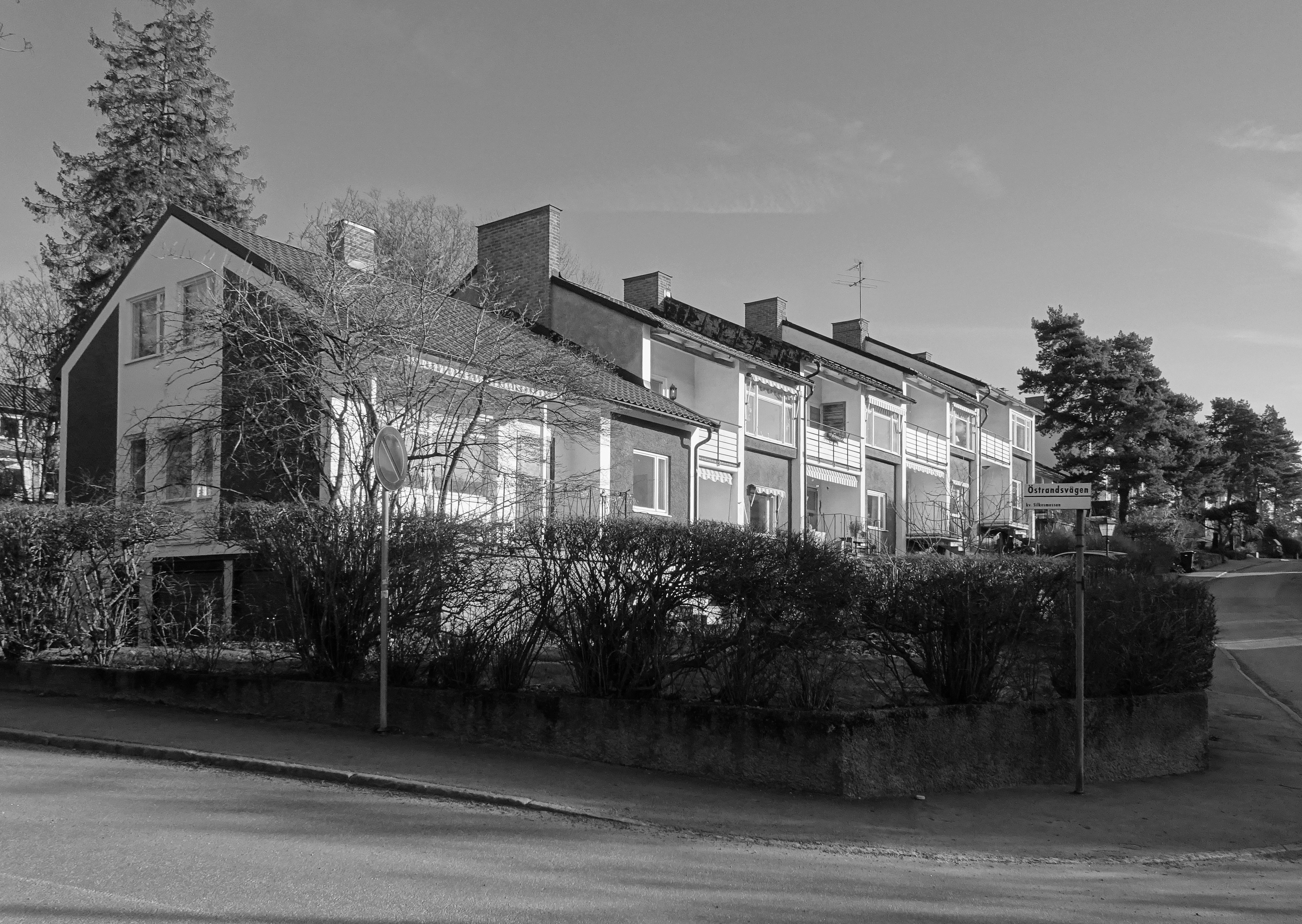 Vivstavarvsvägens radhusområde, byggår 1952, arkitekt Erik Dahl (Vivstavarvsvägen 169-177 sedd från Östrandsvägen)